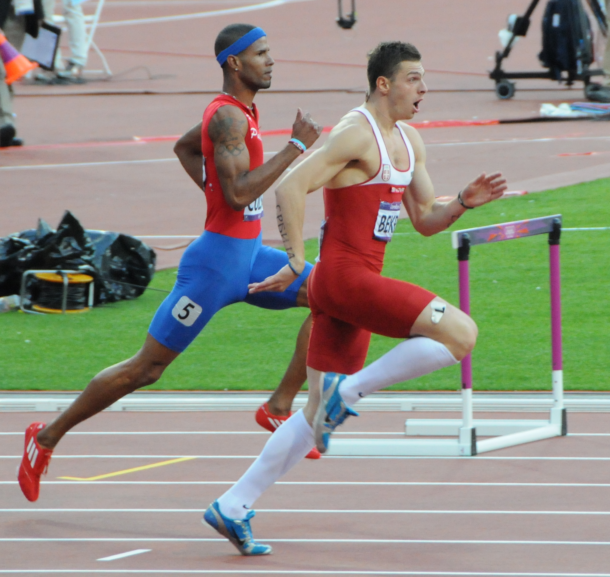 2ème demi finale du 400 haies aux JO de London 2012 remportée par le cubain Javier Culson devant Emir Bekrić